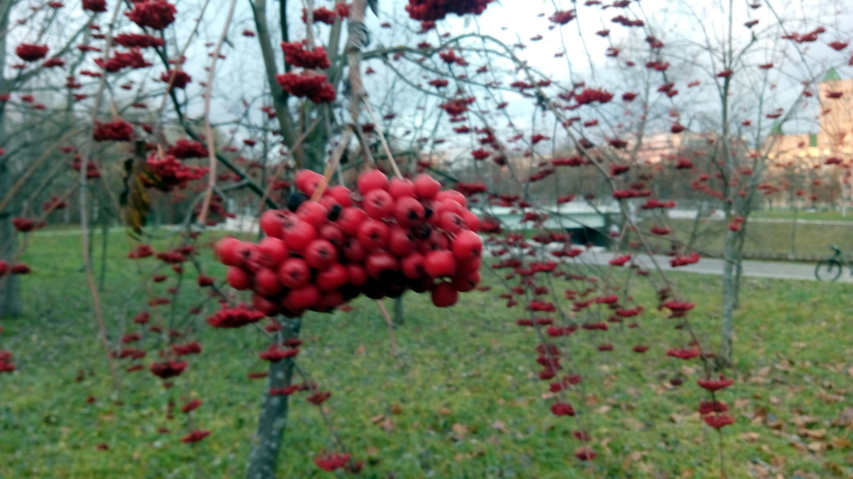 Плады рабіны